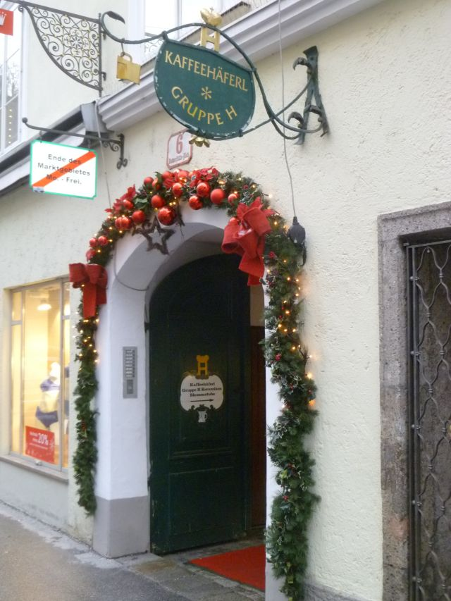 Gudrun Baudisch - Gruppe H